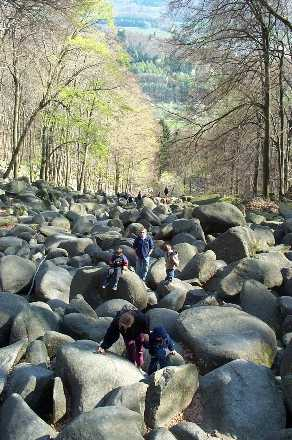 Klettergarten im Felsenmeer im Odenwald, Deutschland